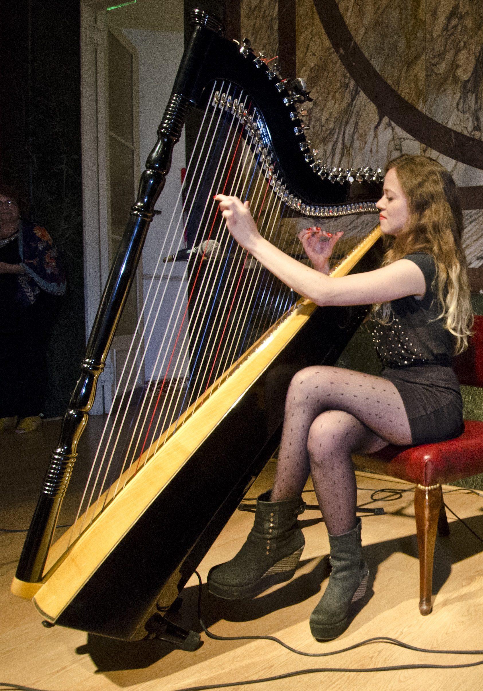 Muestra "Secretos de una Resistencia", imágenes del Paraguay, en el Espacio Caloi, Buenos Aires. Fotos: Romina Santarelli